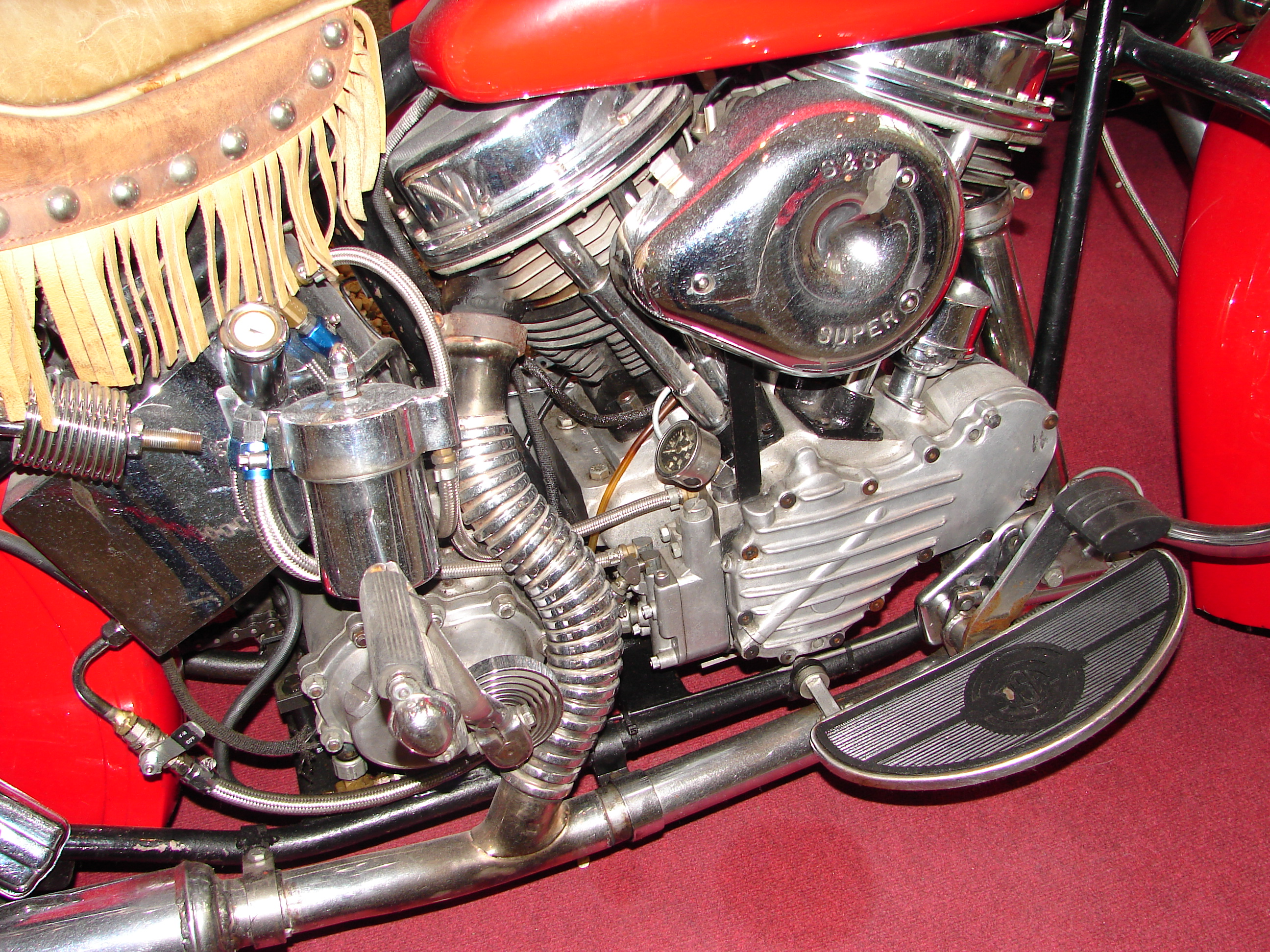 Harley Davidson - Harley Davidson Ausstellung Berlin Ostbahnhof Pan Head, Baujahr 1948, 50PS, 1200ccm